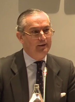 Arsenio Fernández de Mesa, 2014 (Guardia Civil).